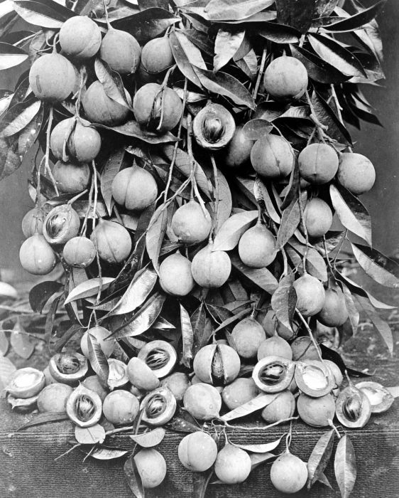 Negatief. Voor velen in heden en verleden zijn de begrippen 'Molukken' en 'specerijen' zo goed als identiek. De Molukken werden ook vaak de Specerij Eilanden genoemd, waarbij het dan vooral om Ambon en Banda ging. Op Ambon had de VOC de teelt van kruidnagels geconcentreerd (en elders verboden), terwijl op Banda de nootmuskaat (of de muskaatnoten) groeide. Naast de peper waren het deze kruiden die de Europeanen naar Azië lokten. De Portugezen en Spanjaarden arriveerden er als eersten, de Nederlanders en de Engelsen kwamen er later. Het was uiteindelijk de in 1602 in Nederland opgerichte Vereenigde Oostindische Compagnie (VOC) die hier een monopolie op de handel in specerijen vestigde. (P. Boomgaard, 2001). Nootmuskaatvruchten